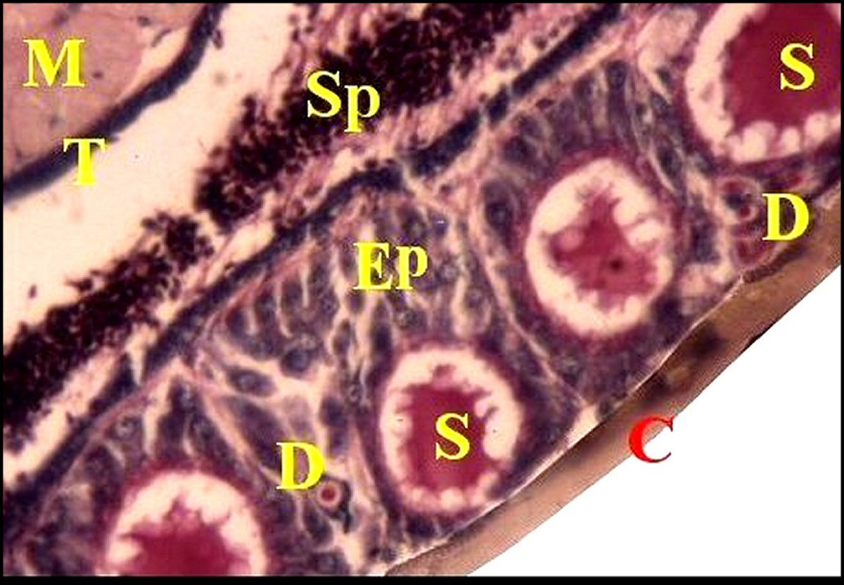 Glandes acinoïdes prégonoporales de Tetragnatha extensa, détails. Coupe histologique transversale.